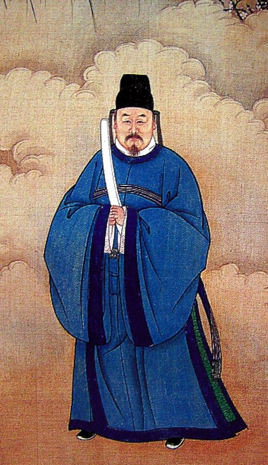 中文（香港）: 明代寫實容像